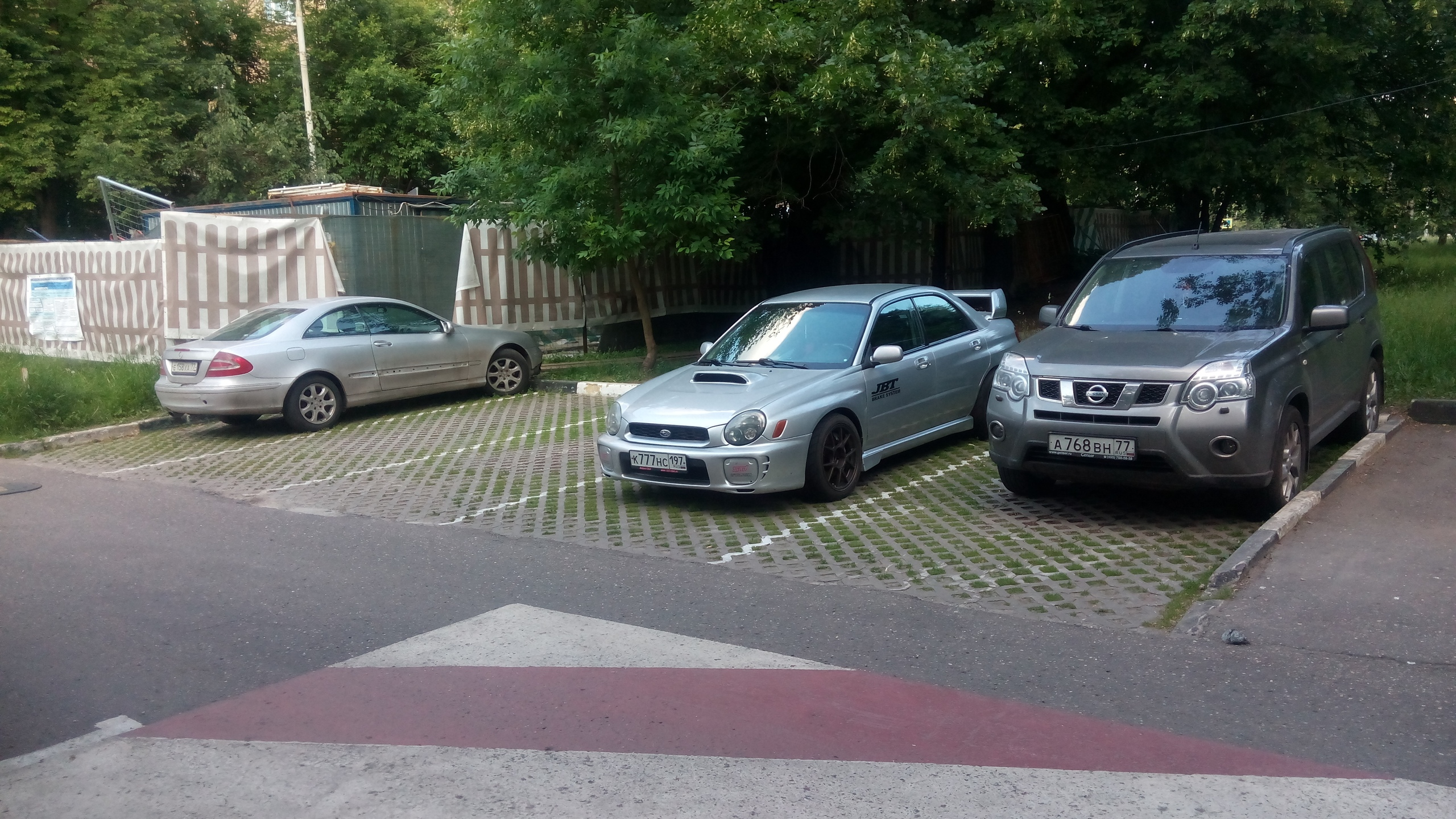 Экопарковка в одном из дворов Москвы, июнь 2018.